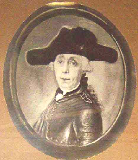 Cornelis Jacob van de Graeff (ook Van de Graaff), gouveneur van de Kaapprovincie, stichter van Graaff-Reinet